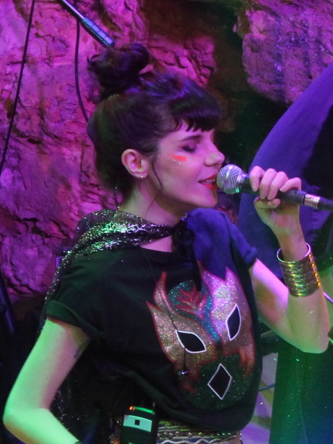 Gaye Su Akyol, Türk müzisyen.